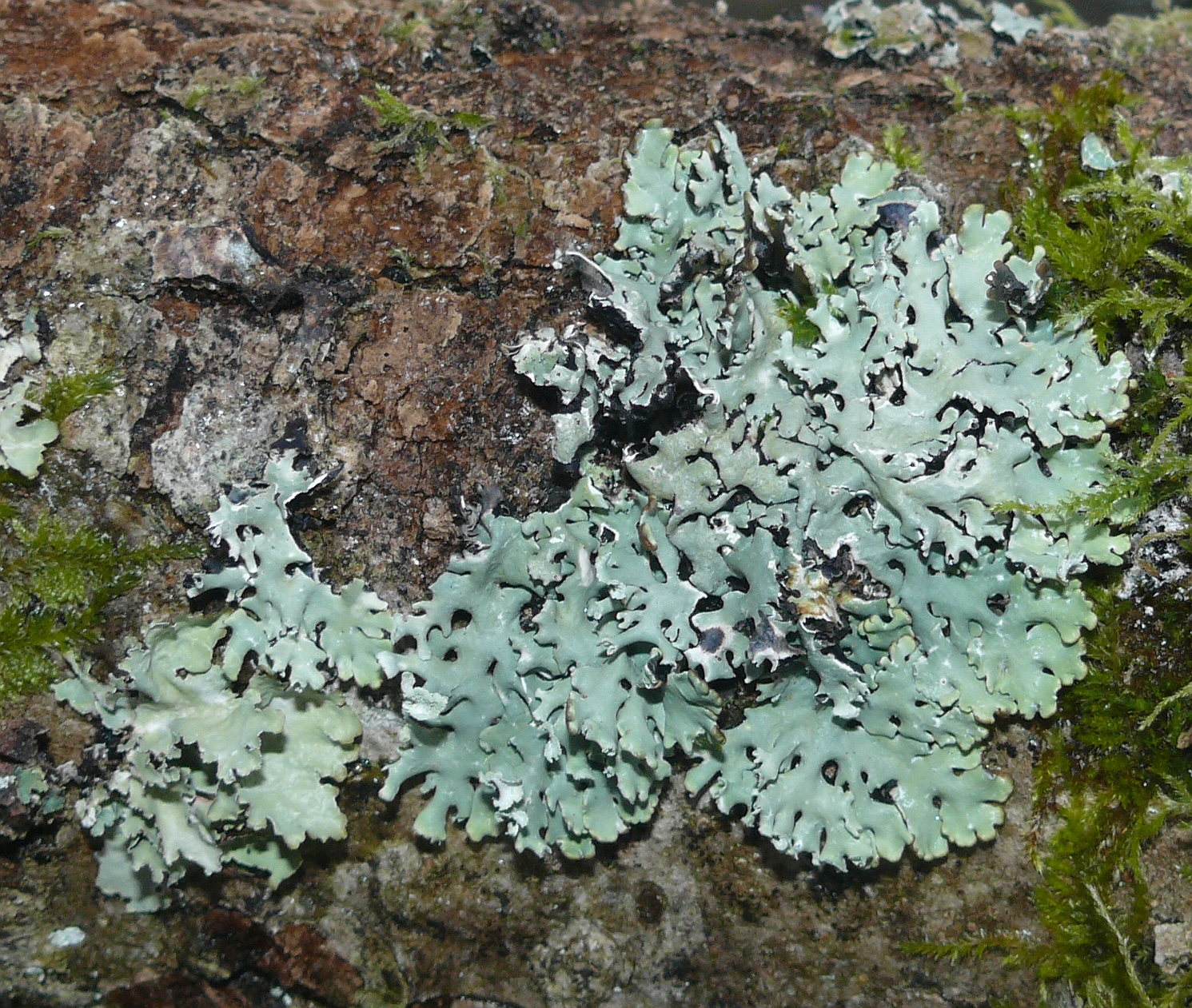 Hypogymnia physodes, Schwäbisch-Fränkische Waldberge, Germany